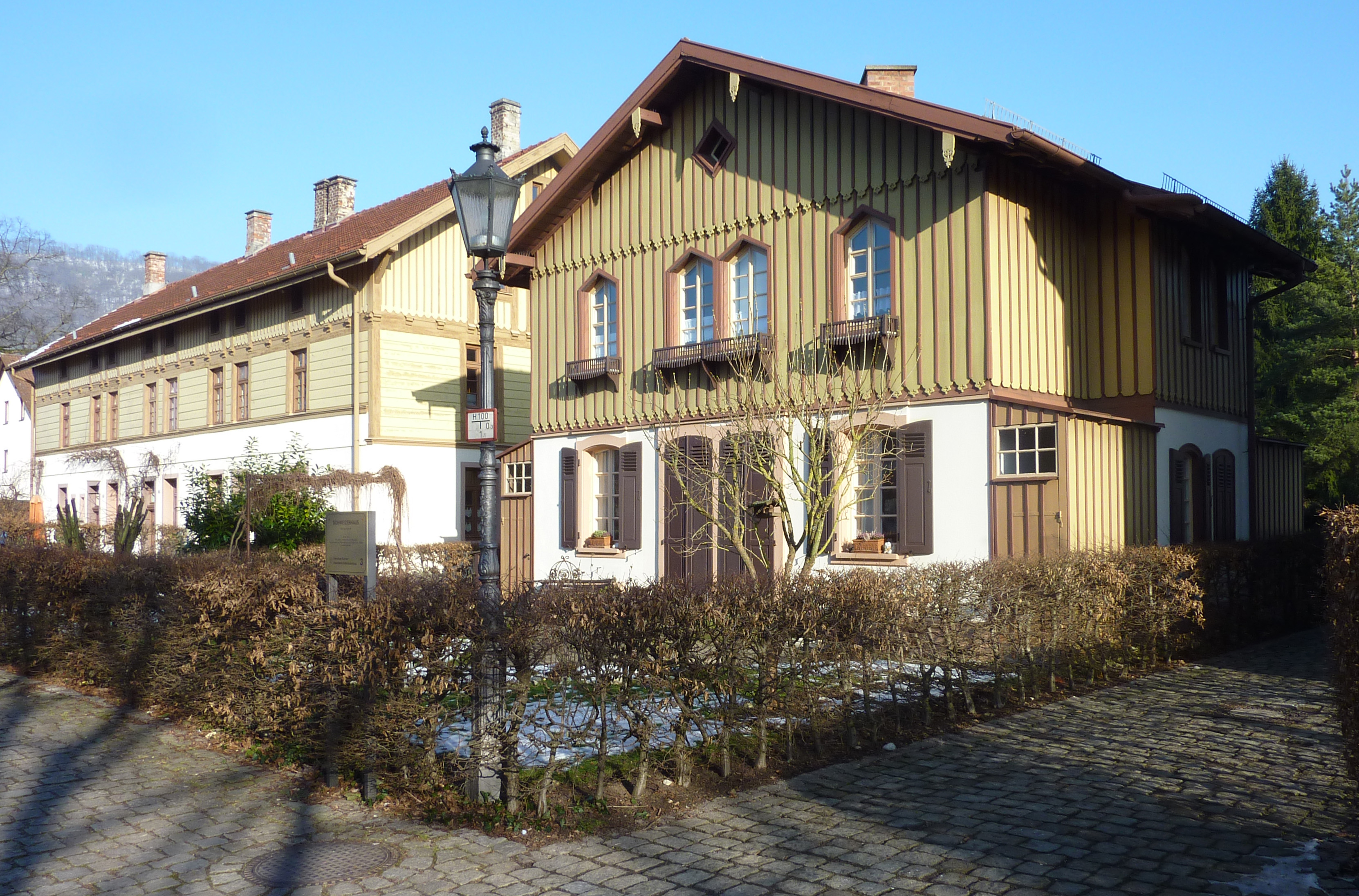 Das 1864 erbaute Schweizerhaus in der Historischen Arbeitersiedlung Kuchen mit vier Wohnungen.